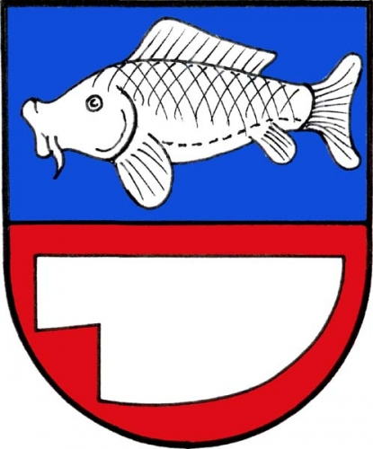 znak, Vír, okres Žďár nad Sázavou